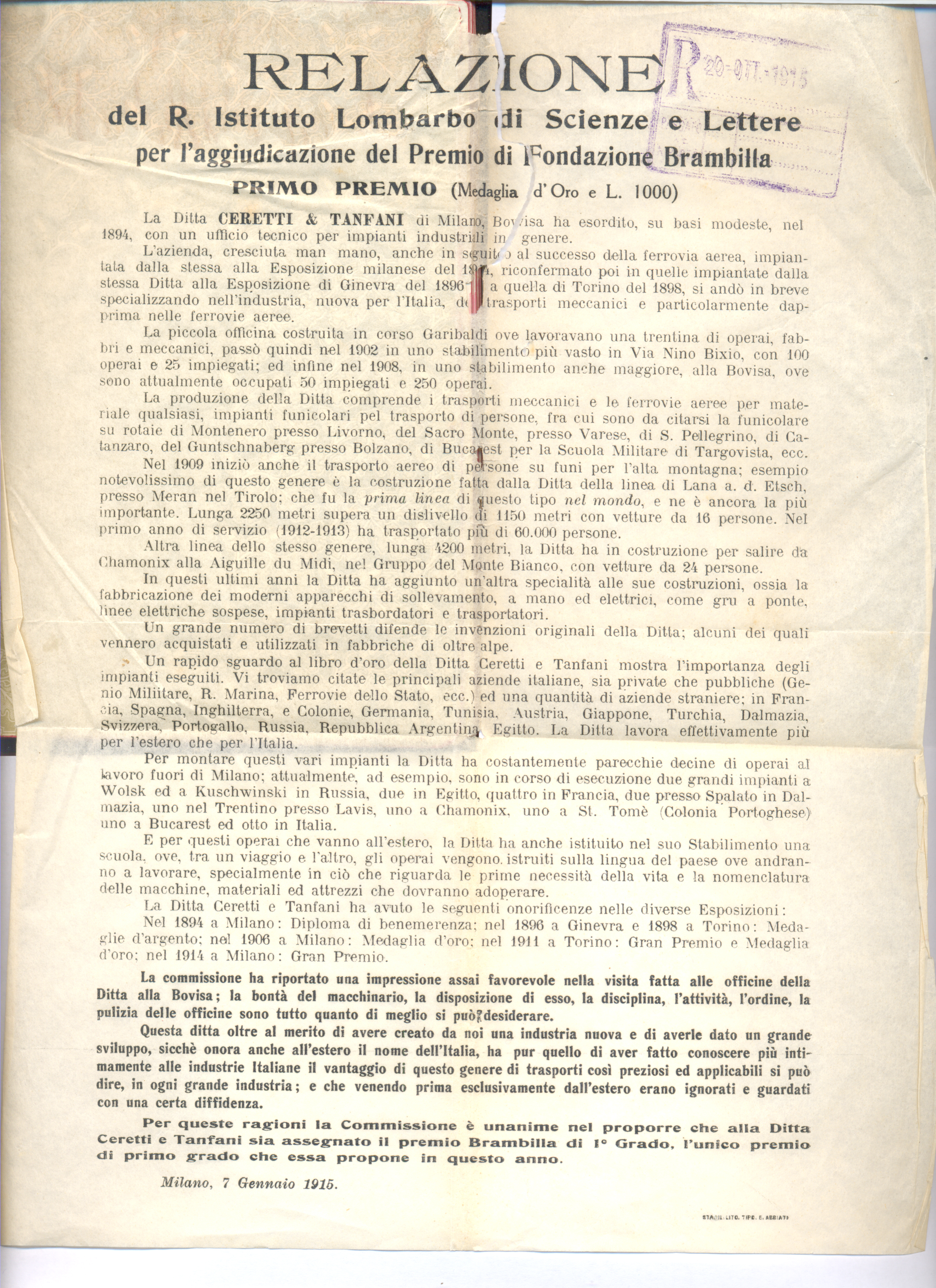 Relazione sul 1° Premio Brambilla (medaglia d'oro) alla Ceretti & Tanfani - 7 Gennaio 1915